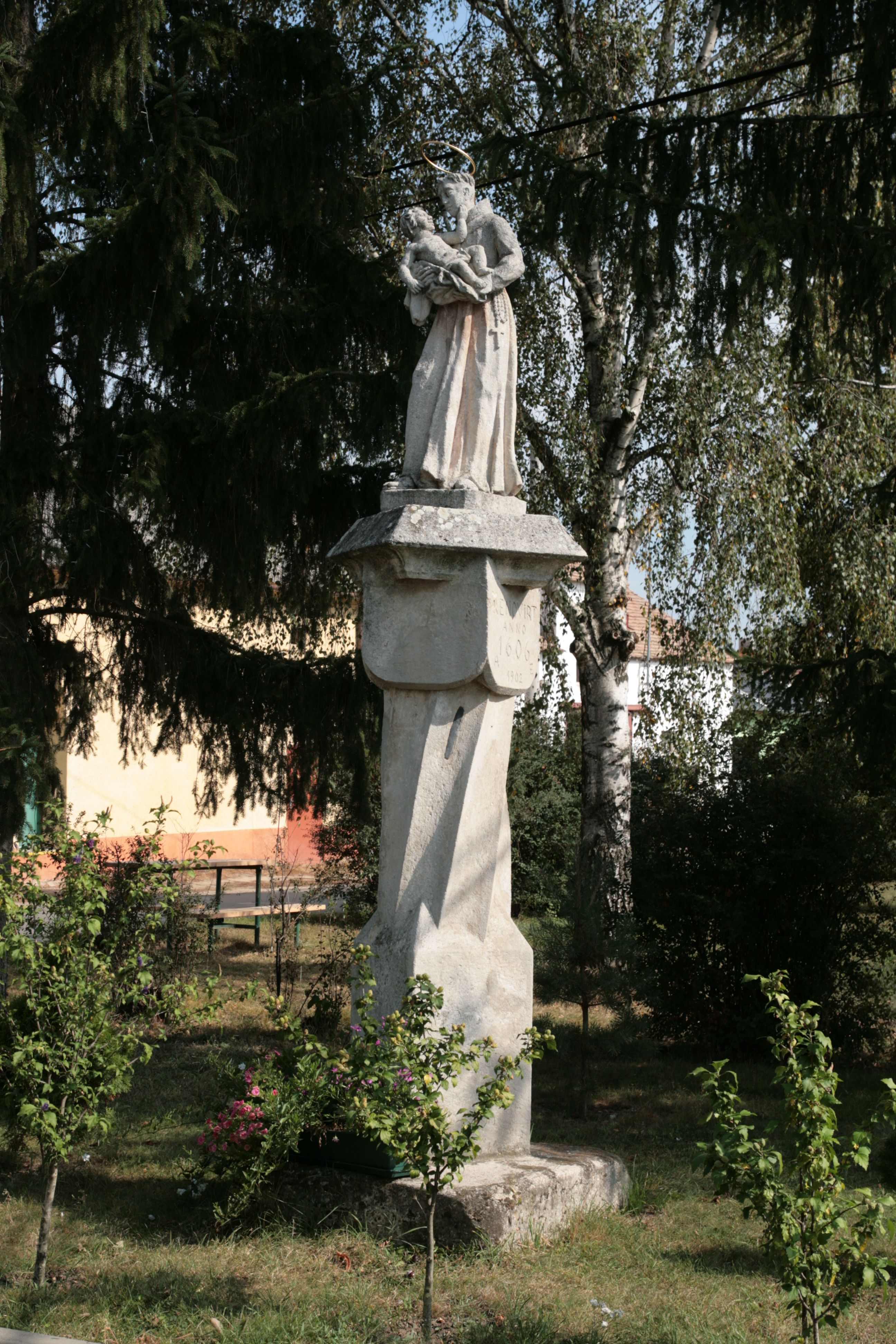 Obec Křídlůvky v okrese Znojmo. Socha sv. Antonína (torzo staršího gotického sloupu s dodatečně umístěnou barokní sochou) na návsi.